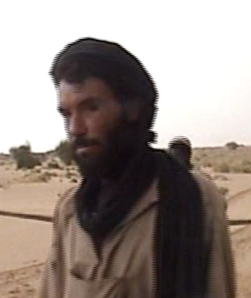 Mokhtar Belmokhtar